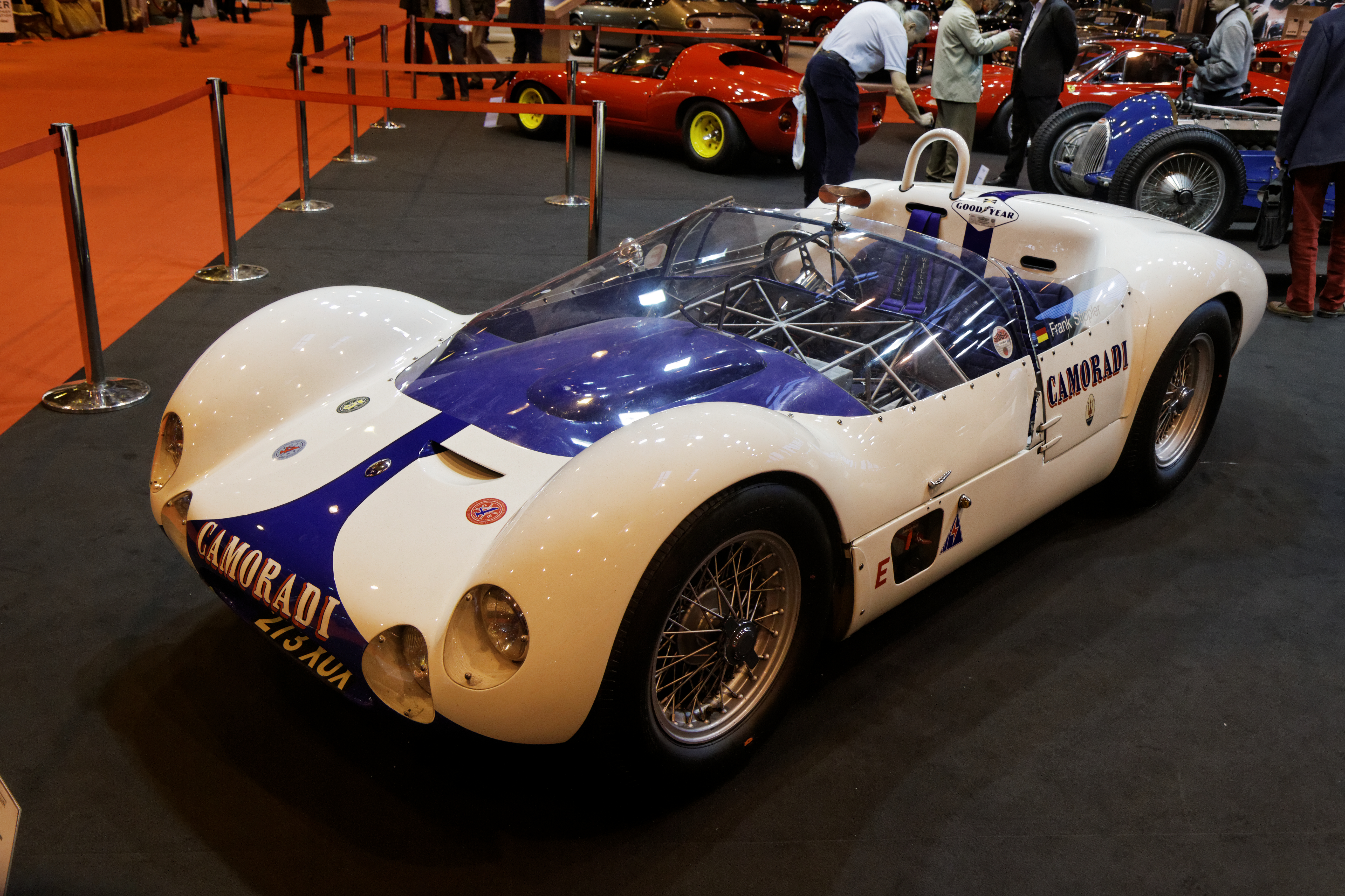 Une Maserati Tipo 60-61 Streamliner Birdcage présentée lors du salon Retromobile 2014.